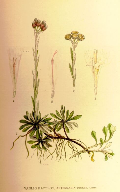 Antennaria dioica 1. stånd med honkorgar 2. stjälk med hankorgar 3. male flower (8/1) 4. early female flower (8/1) 5. later female flower (8/1)